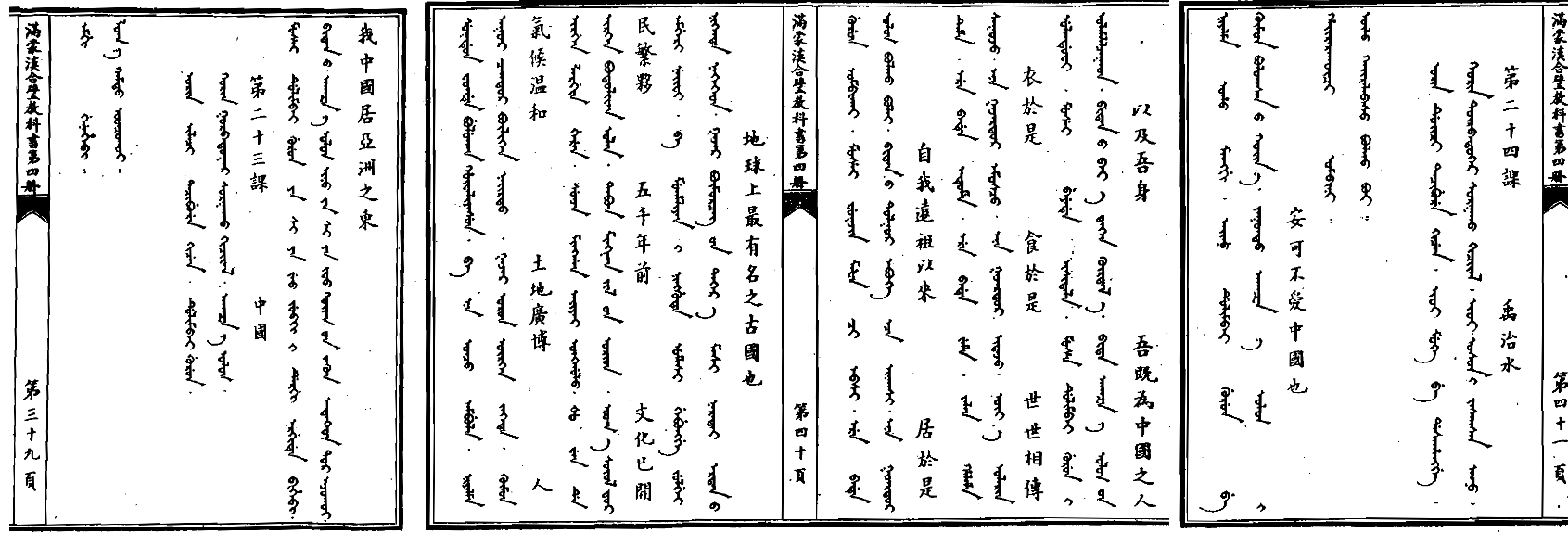 中文（台灣）: 滿蒙漢合璧教科書 (節錄)